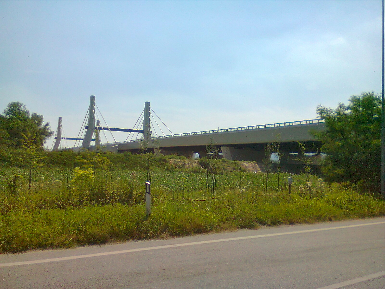 Viadotto autostradale sul Bacchiglione della A31 nei pressi del casello di Longare. Scatto preso in Colzè di Montegalda.